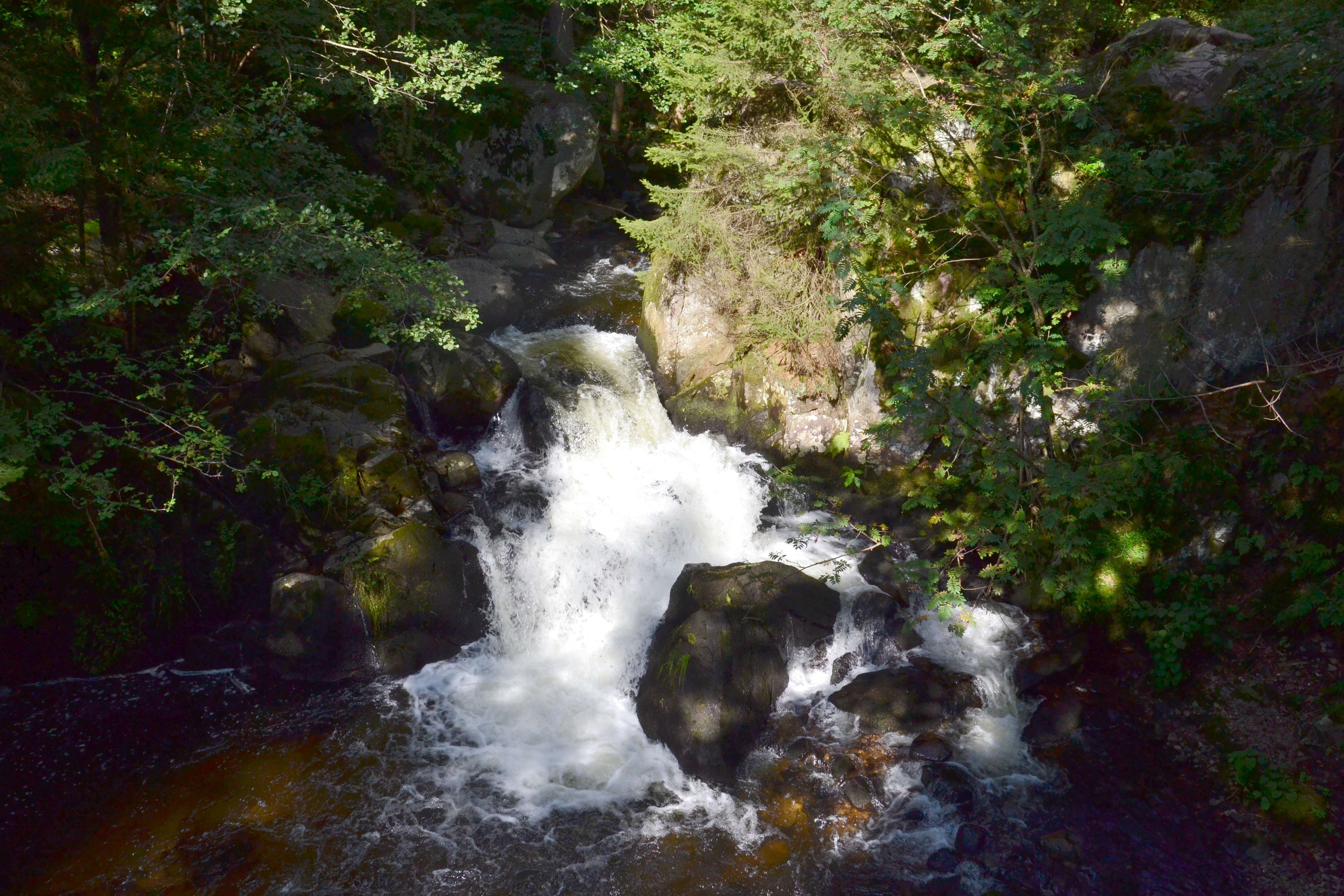 Le saut des Cuves sur la Vologne sur la limite Gérardmer - Xonrupt-Longemer.